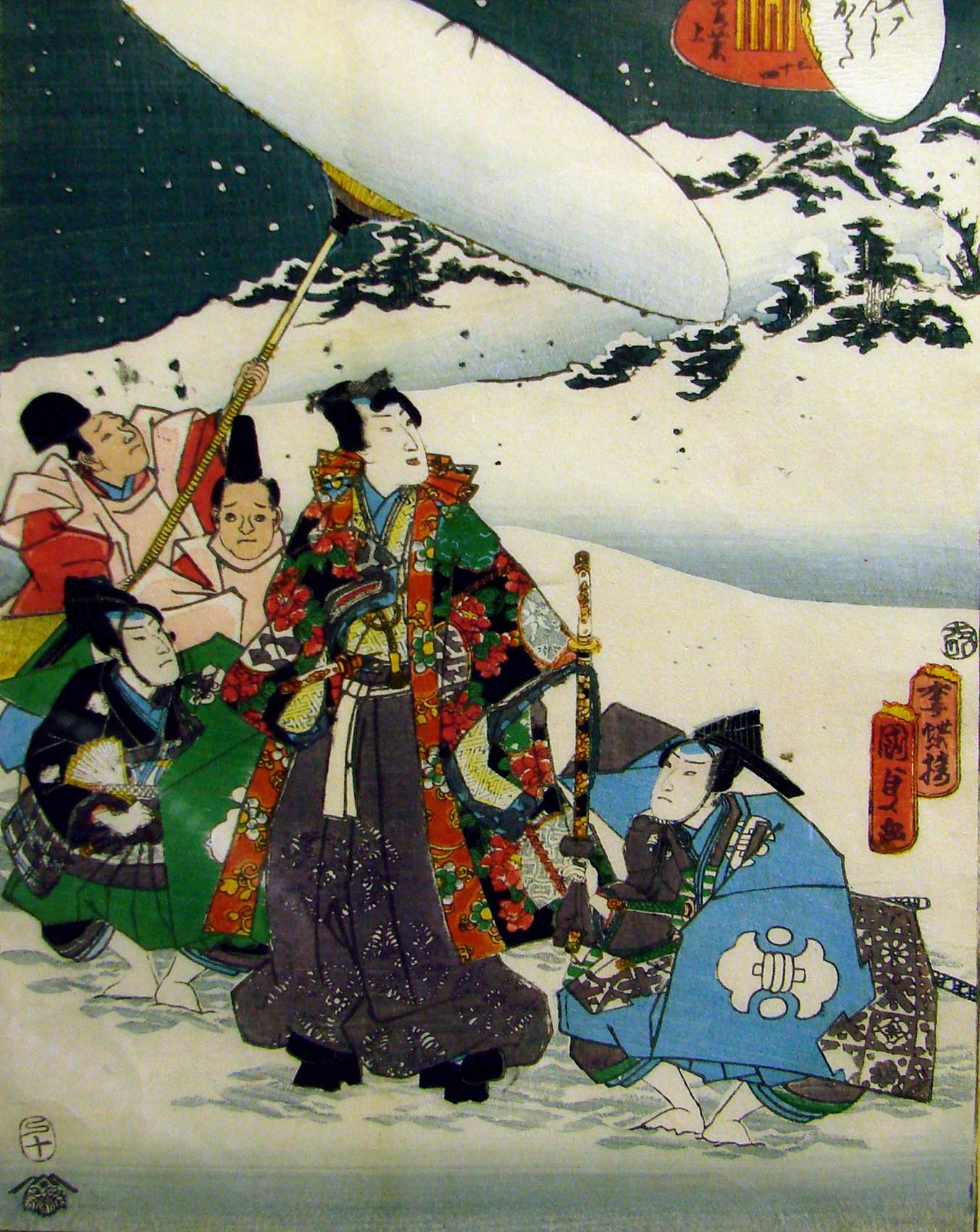 Illustration du Genji Monogatari, 19ème siècle. Musée Saint-Remi à Reims.